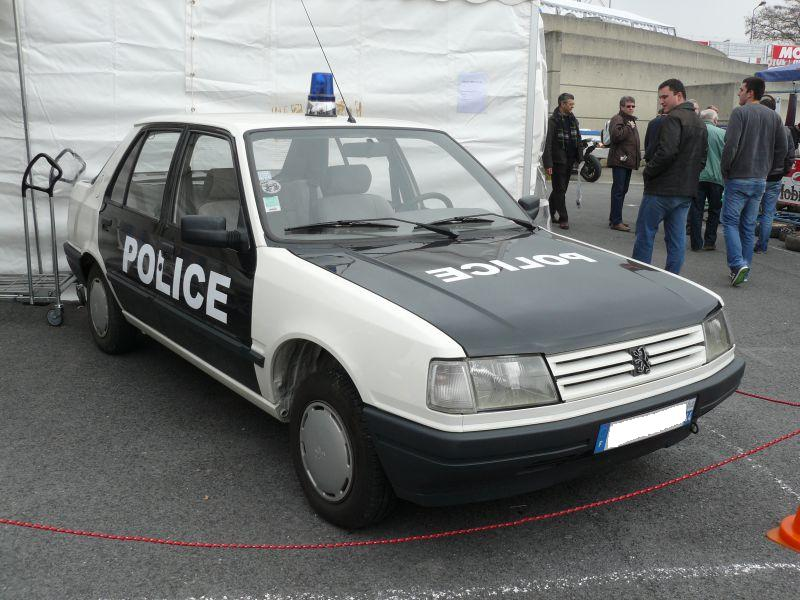 Français cadien: Reims 2012